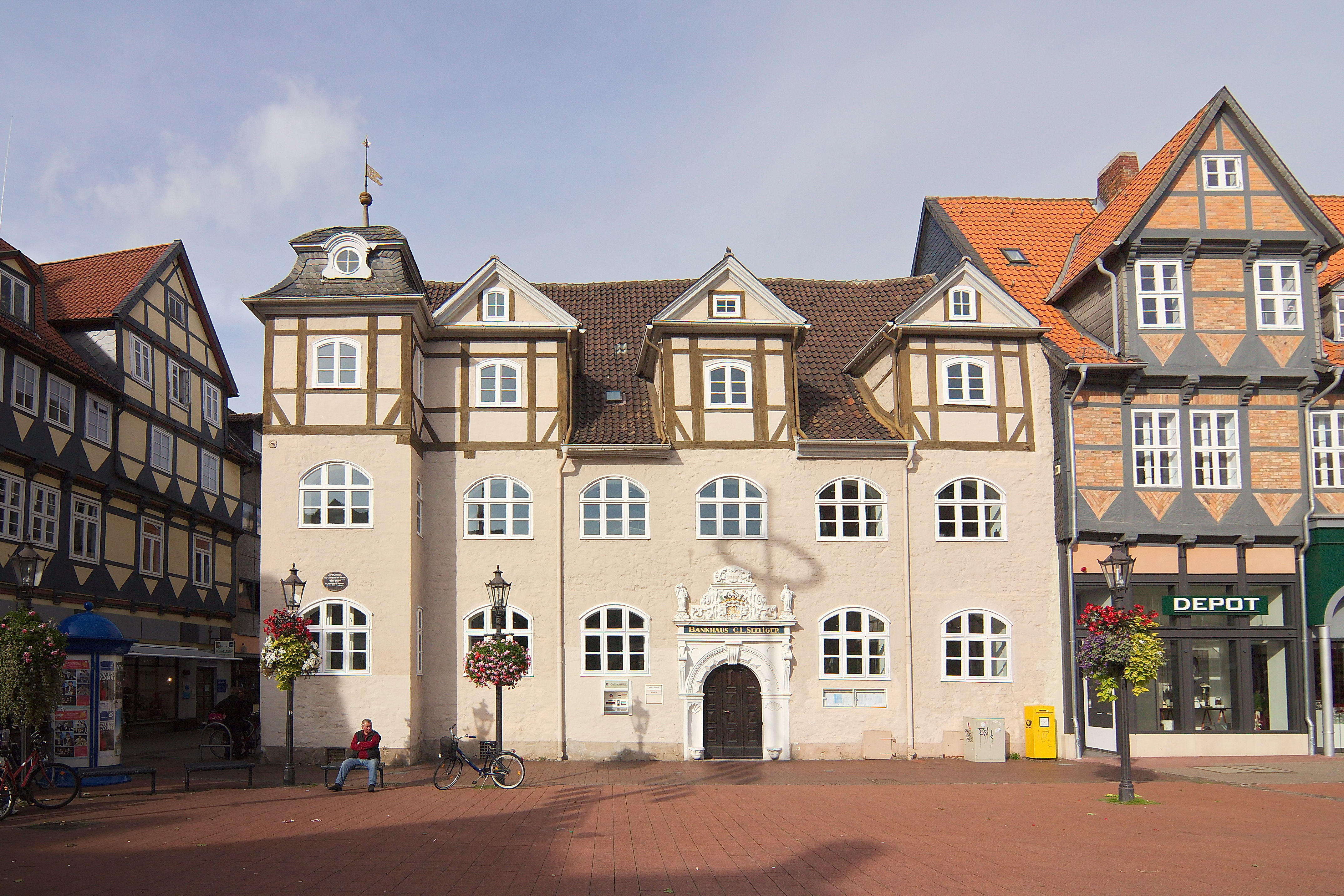 Ortsblick in Wolfenbüttel, Niedersachsen, Deutschland auf das Bankhaus C. L. Seeliger von 1794 an der Langen Herzogstra0e 63 / Stadtmarkt